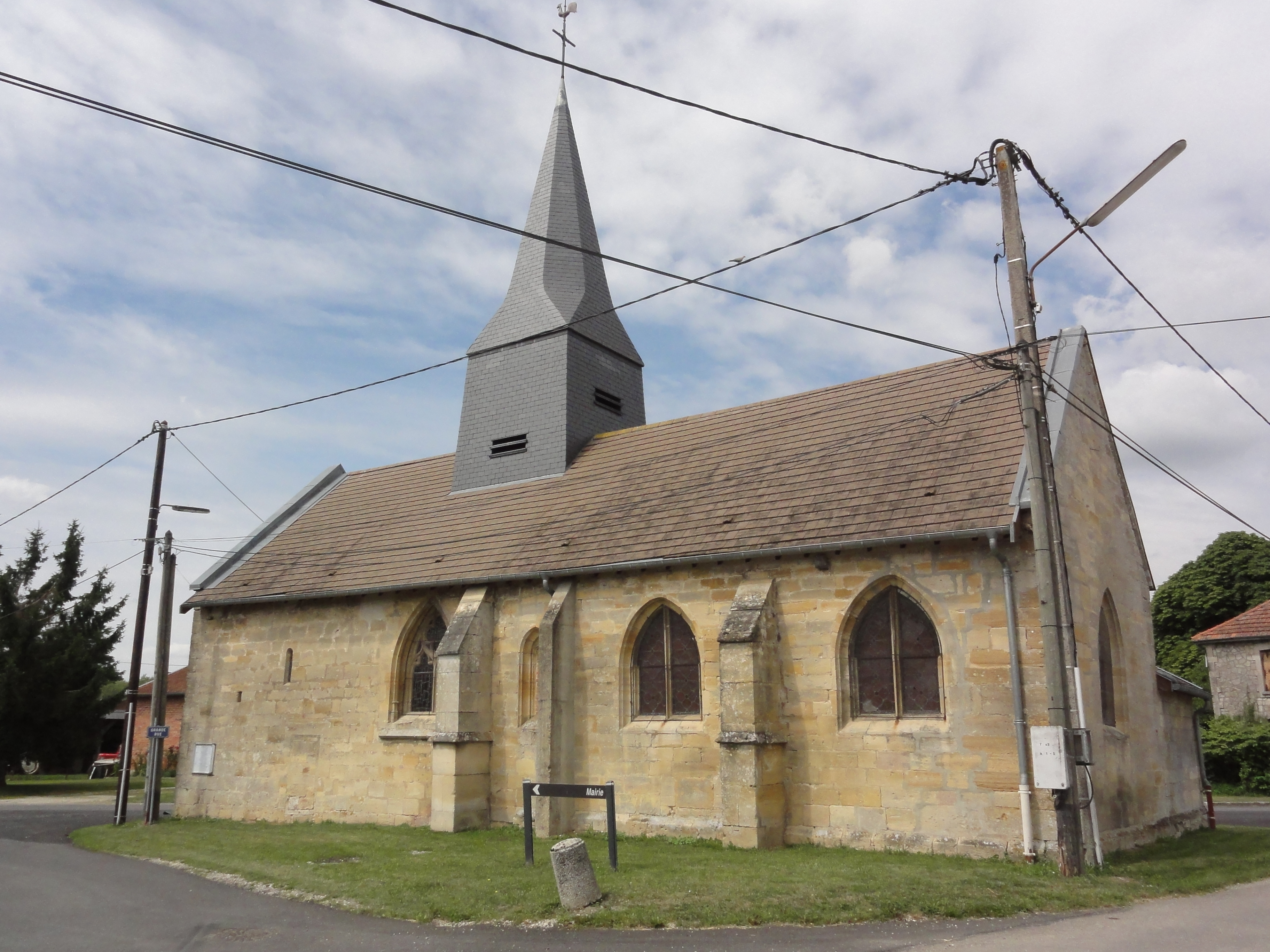 Remennecourt (Meuse) église